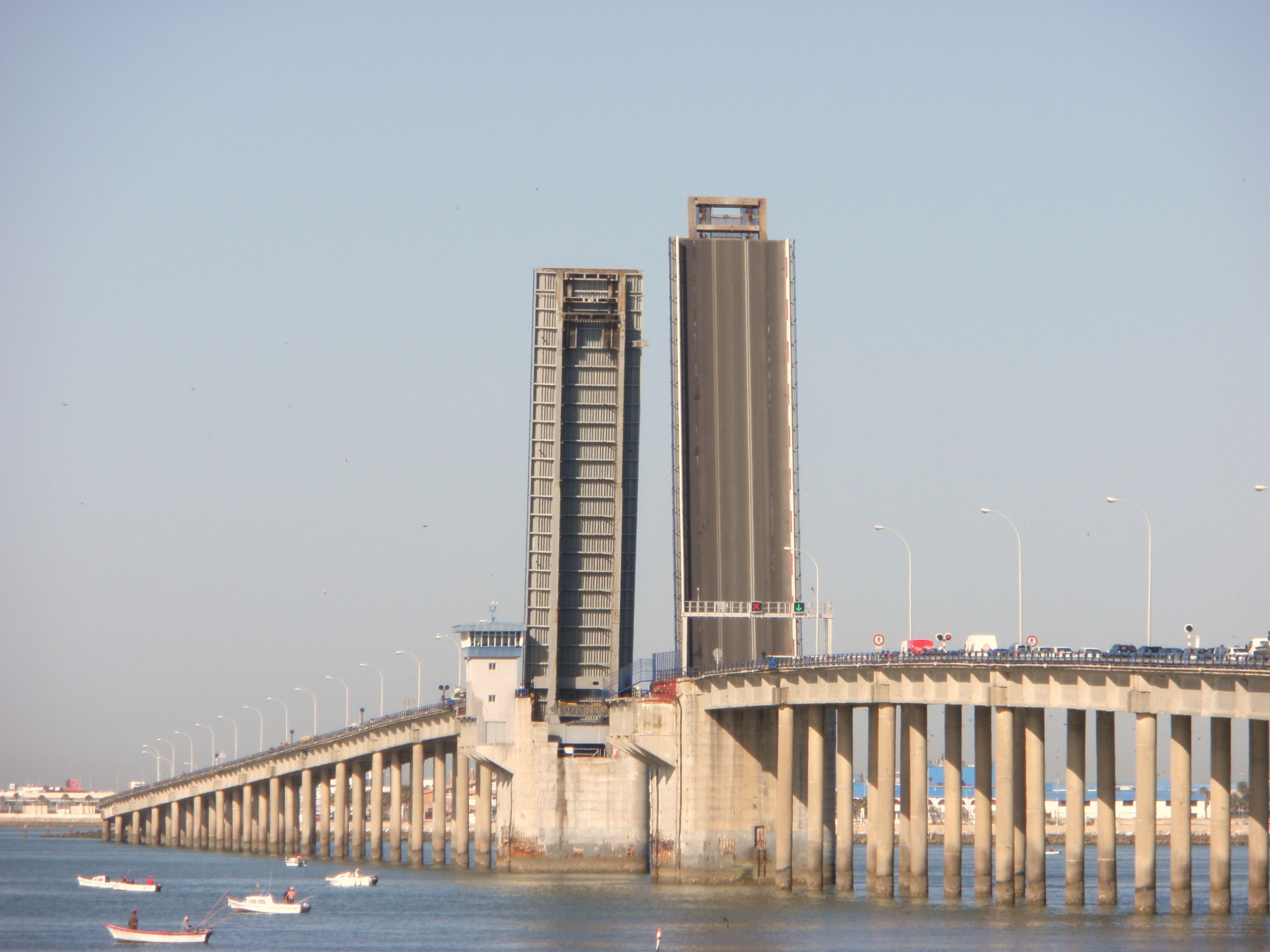 Puente José León de Carranza abierto para el paso de un barco.